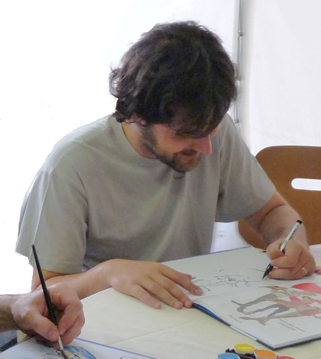 José Luis Munuera au Festival européen de la bande dessinée Strasbulles 2009